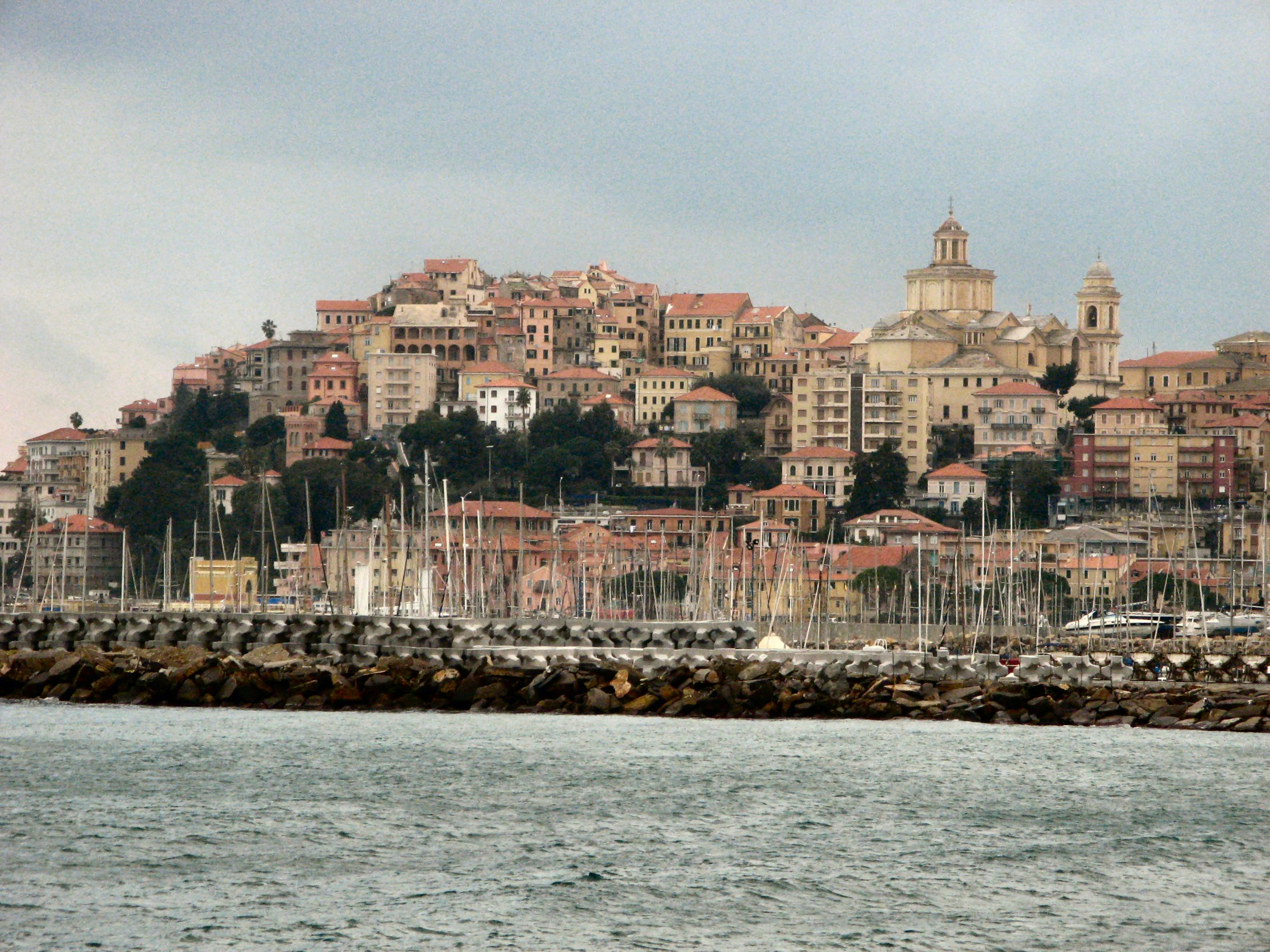 Promontorio del Parrasio (Porto Maurizio, Imperia, Italy)